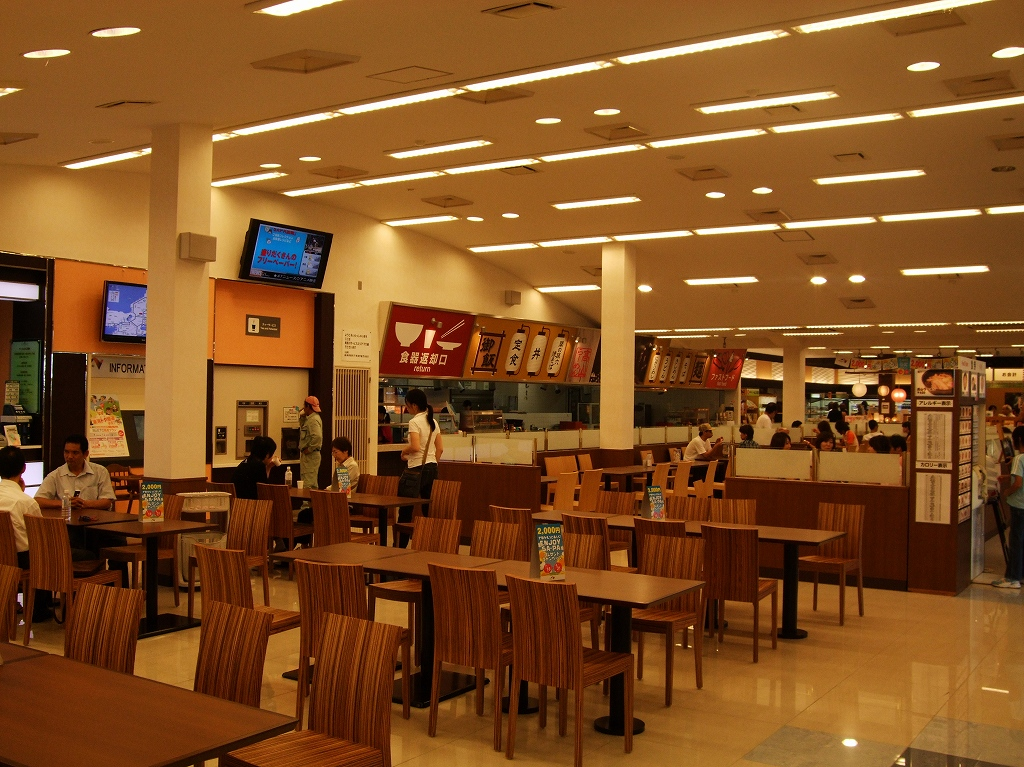 東海北陸自動車道 長良川サービスエリア（下り線・高山方面） リニューアルされた店内の様子